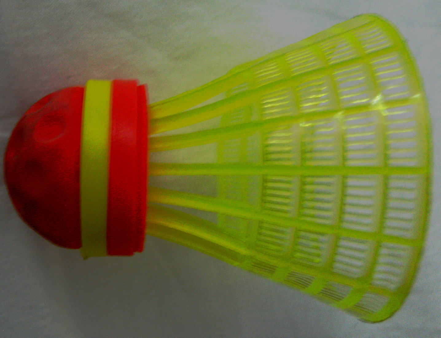 Speeder